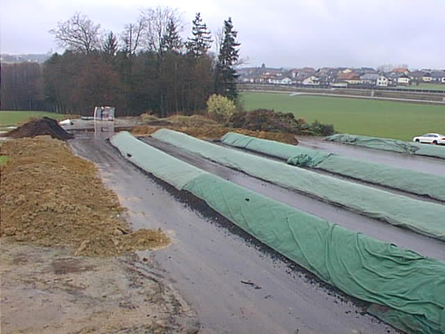 Faremní kompostárna Josefa Bodingbauera v Pregartenu, okres Freistadt; zdroj: Biom.cz, autor: Antonín Slejška